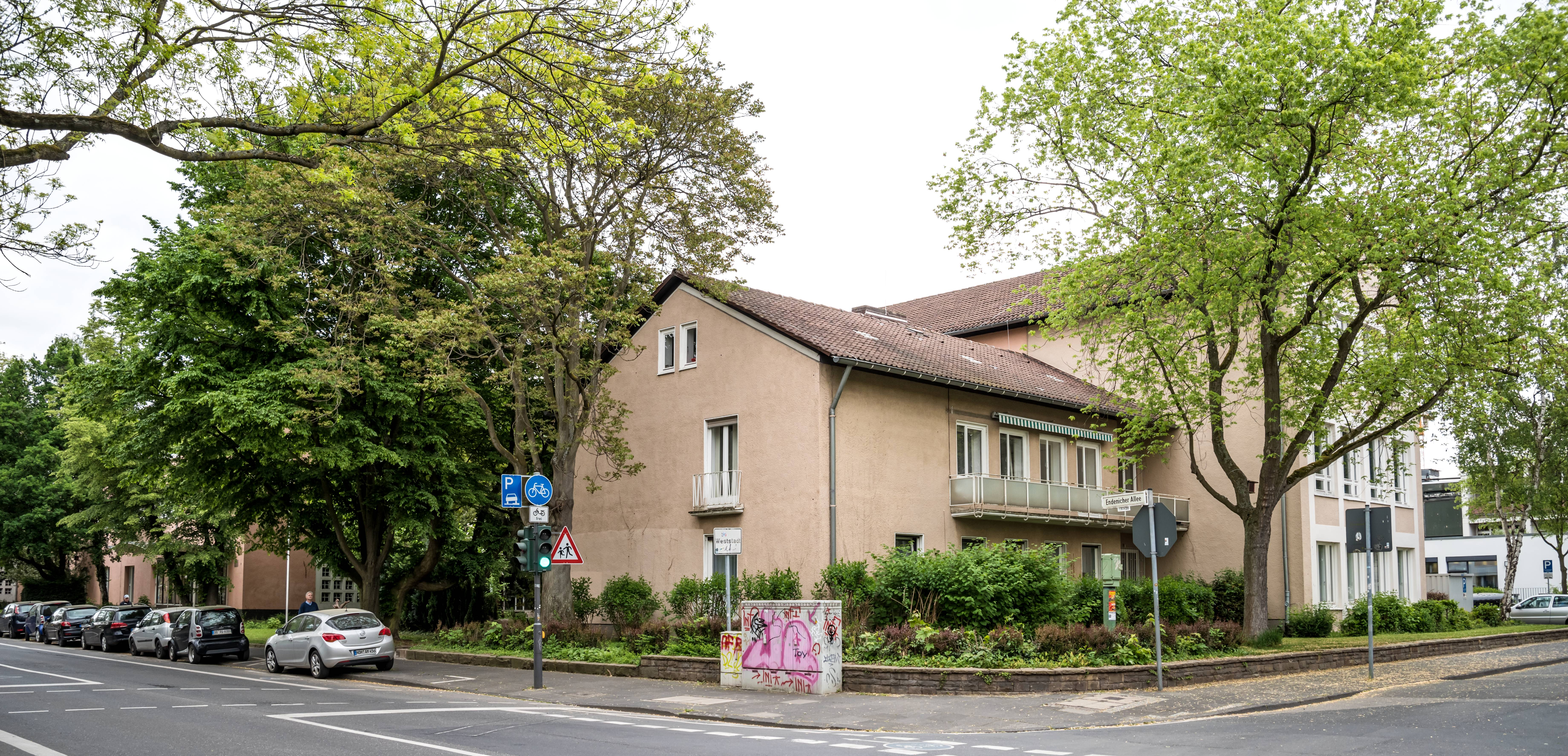 Bilder aus Bonn Das Ernst-Moritz-Arndt Gymnasium in der Endenicher Allee in Bonn-Poppelsdorf Der Neubau wurde am 12. Juni 1951 begonnen. Die ersten 12 Klassen wurden ab dem 3. November 1952 in neuen Räumen unterrichtet. Am 20. Februar 1953 wurde der gesamte Unterricht in den neuen Räumen gehalten. Die Einweihung war am 18. Juni 1953 Das Schulgebäude wurde 2006 unter Denkmalschutz gestellt, da es "charakteristisch ist für die Schularchitektur der Nachkriegszeit"